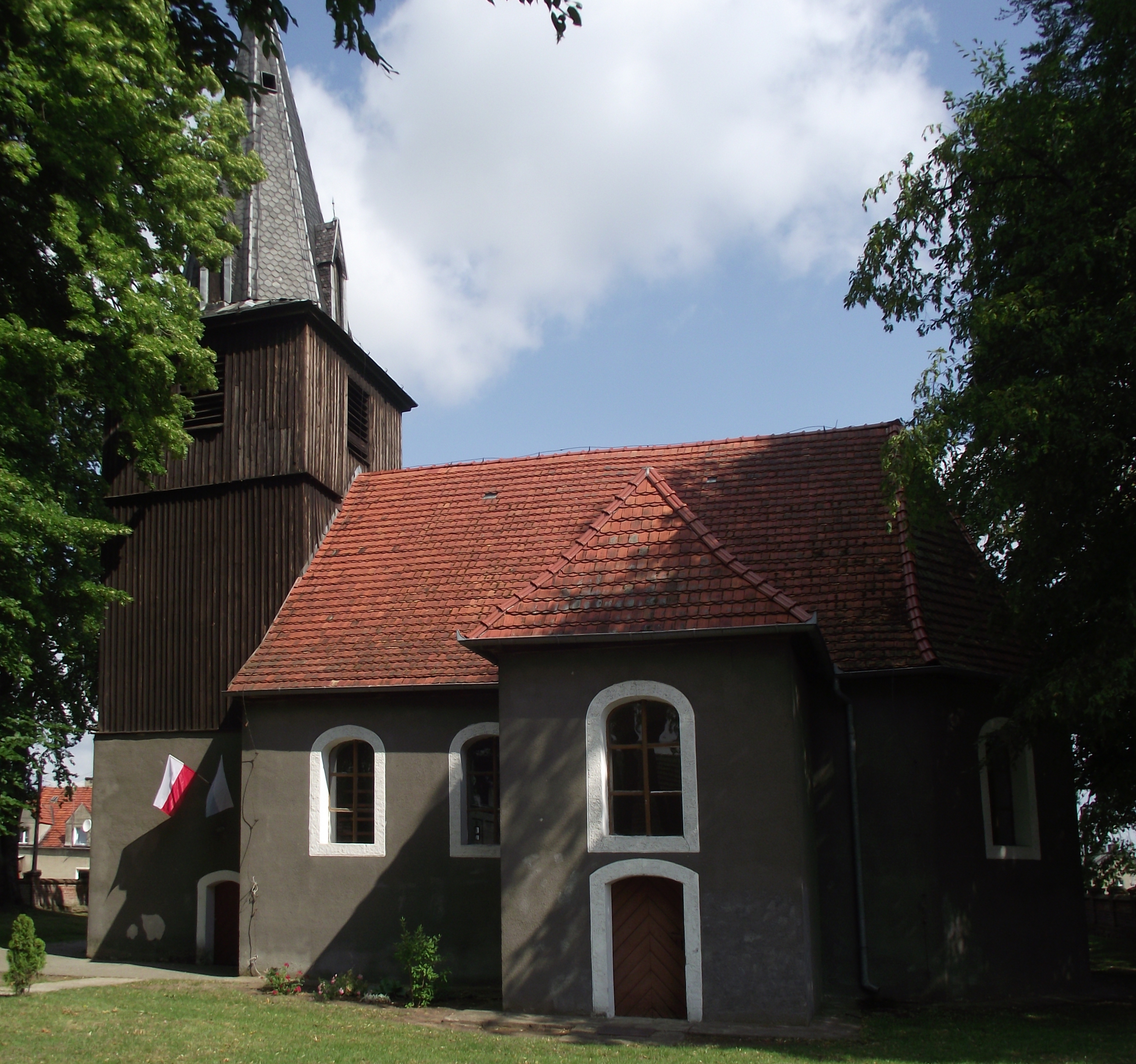 Brzeźno - kościół filialny pw. św. Antoniego (zabytek nr rejestr. 184 i KOK-I-979)